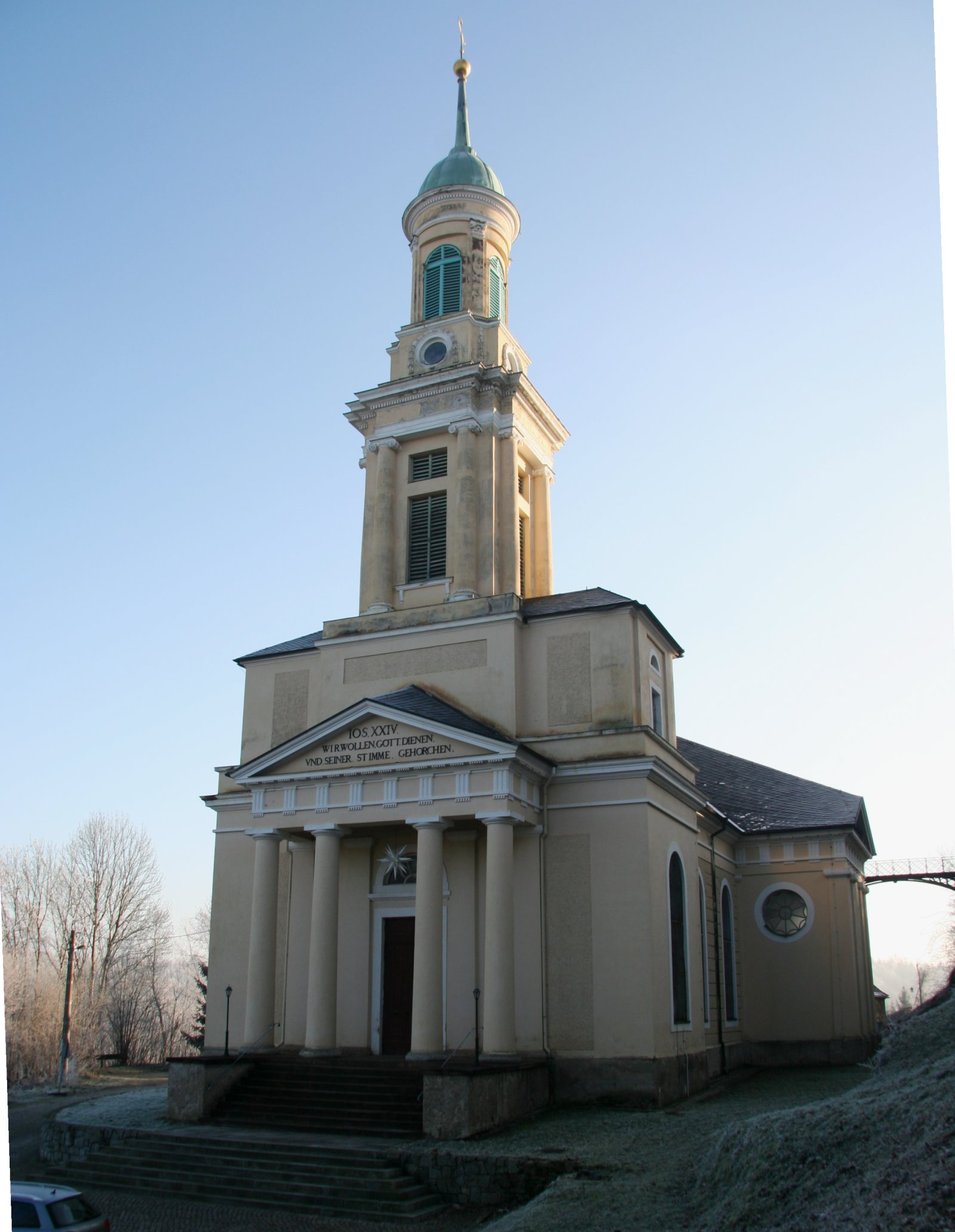 St. Mauritiuskirche am Schloss Wolkenburg an der Zwickauer Mulde